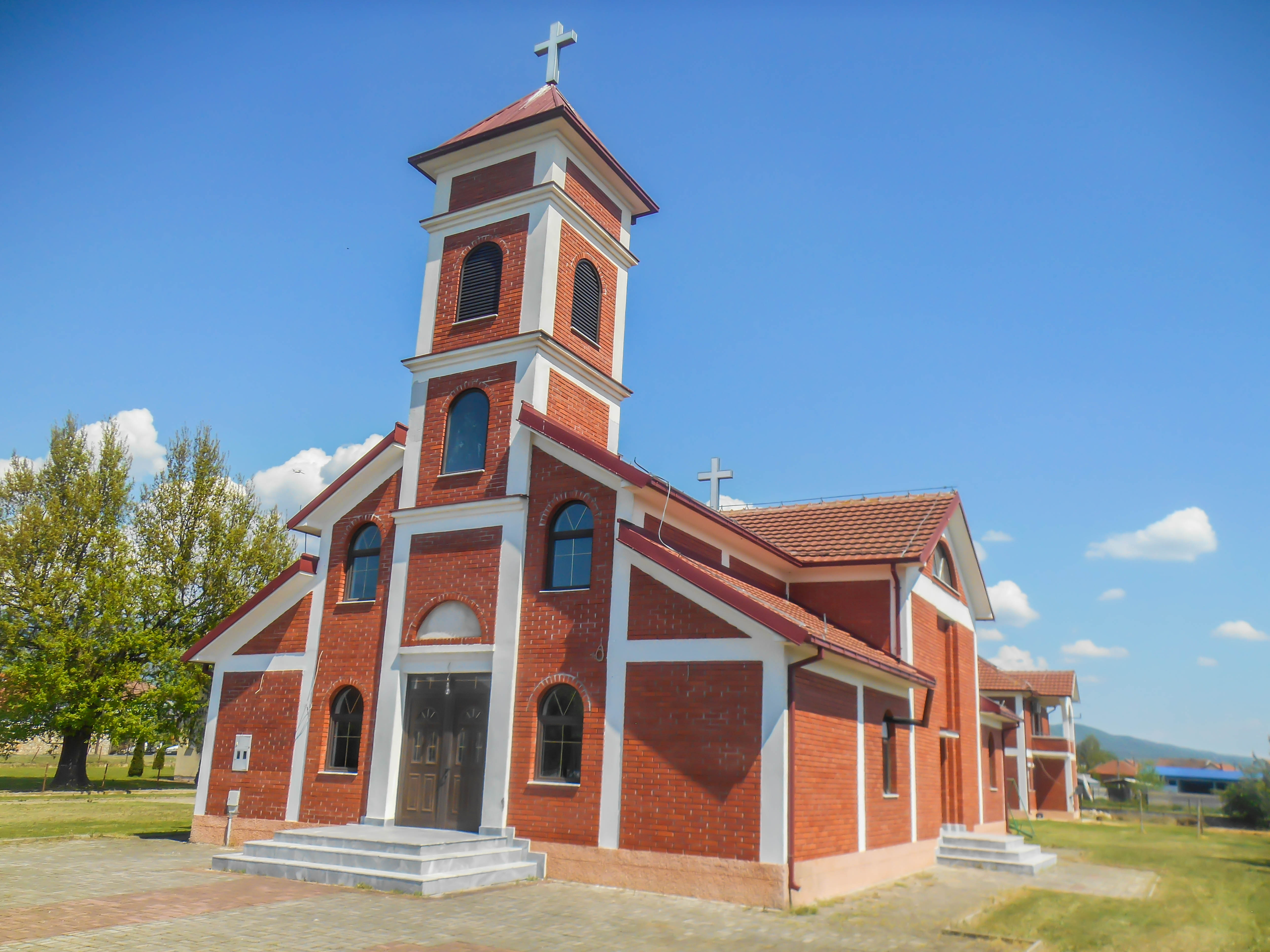 Црква „Св. Никола“ - Секирник